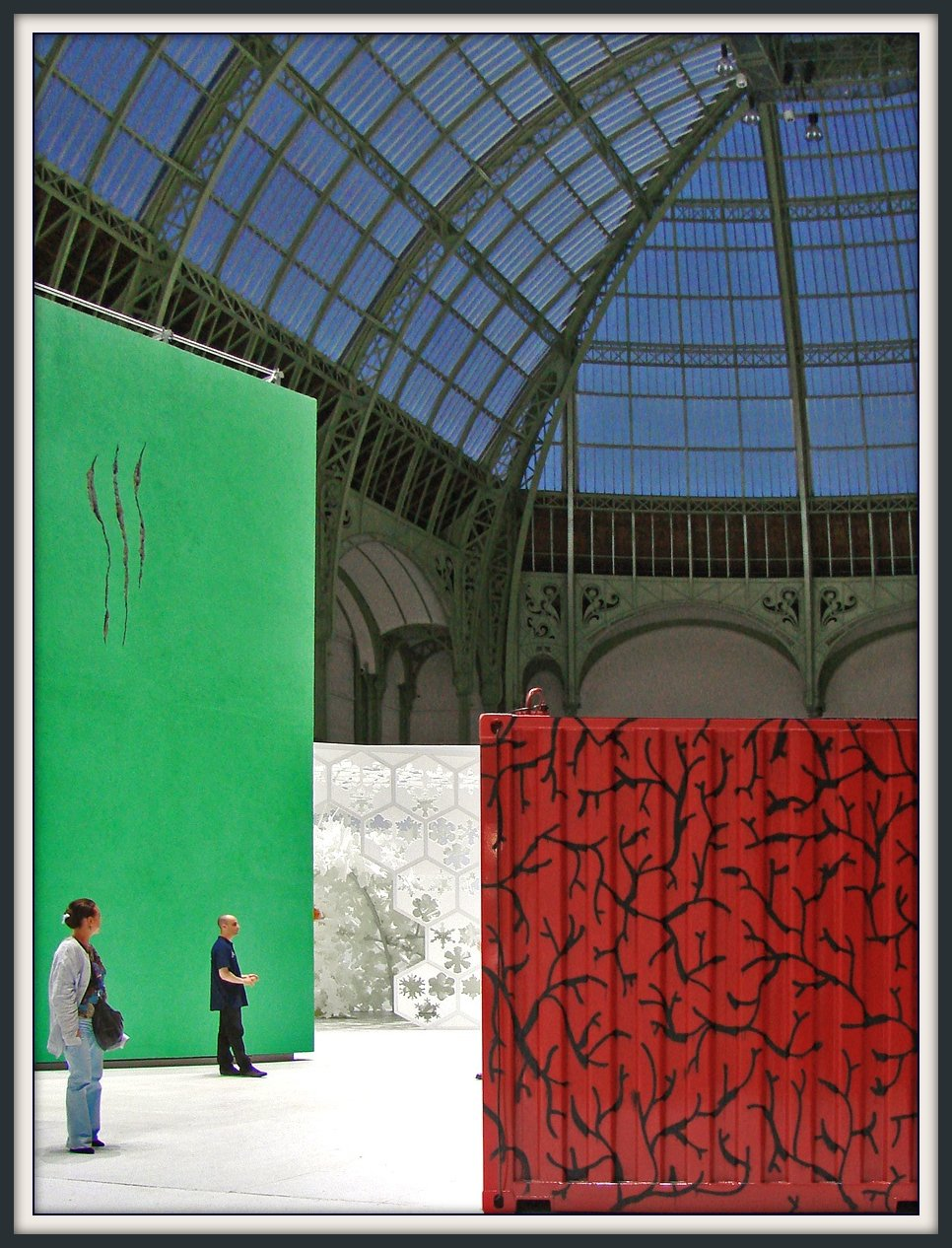 Manifestation triennale, organisée du 24 avril au 1er juin 2009, à l’initiative du Ministère de la Culture et de la Communication, au Grand Palais, à Paris, LA FORCE DE L’ART a pour ambition d’offrir une scène à la création contemporaine en France et aux artistes qui l’animent, dans la diversité de leurs origines et de leurs choix esthétiques. En vert, l'oeuvre de Virginie Yassef intitulée : "Il y a 140 millions d'années un animal glisse sur la plage fangeuse du massif central", 2008 Courtesy galerie G.-P.§ N. Vallois, Paris